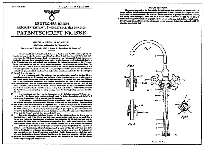 Patentschrift des von Gustav Schmiedl erfundenen "Mischhahn"